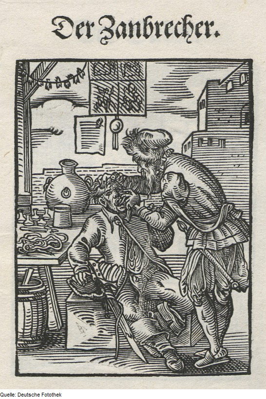 Original image description from the Deutsche Fotothek Ständebuch & Handwerk & Zahnbrecher & Zahnarzt